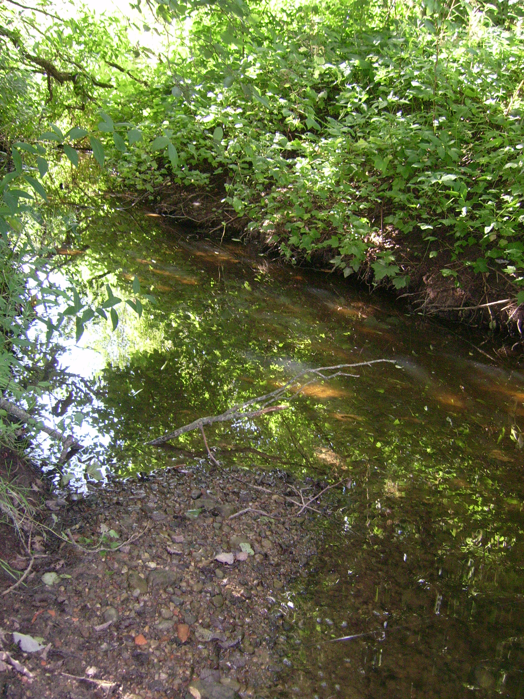 Eržvilkų Upelis